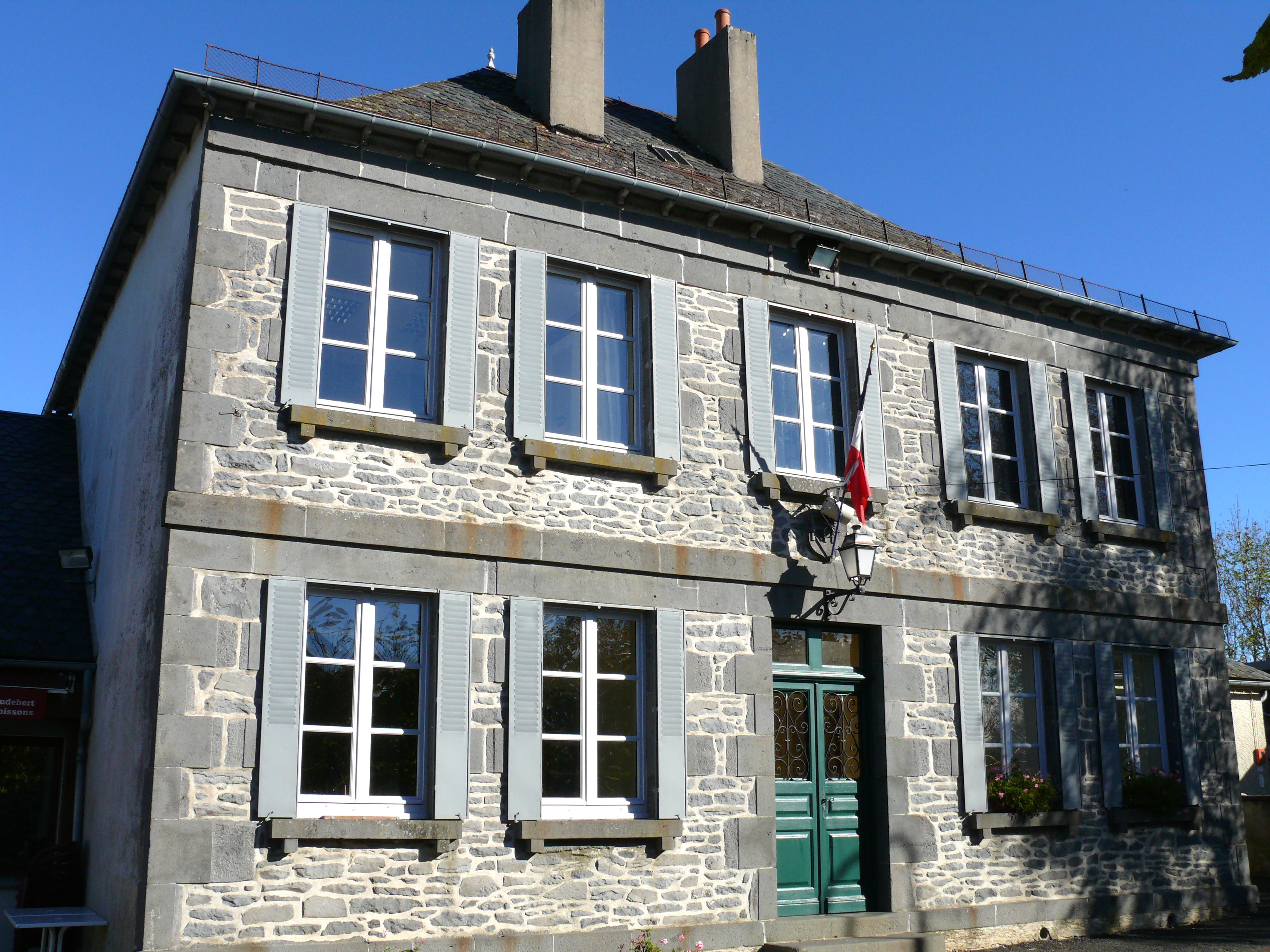 Le Vigean (Cantal) - Mairie